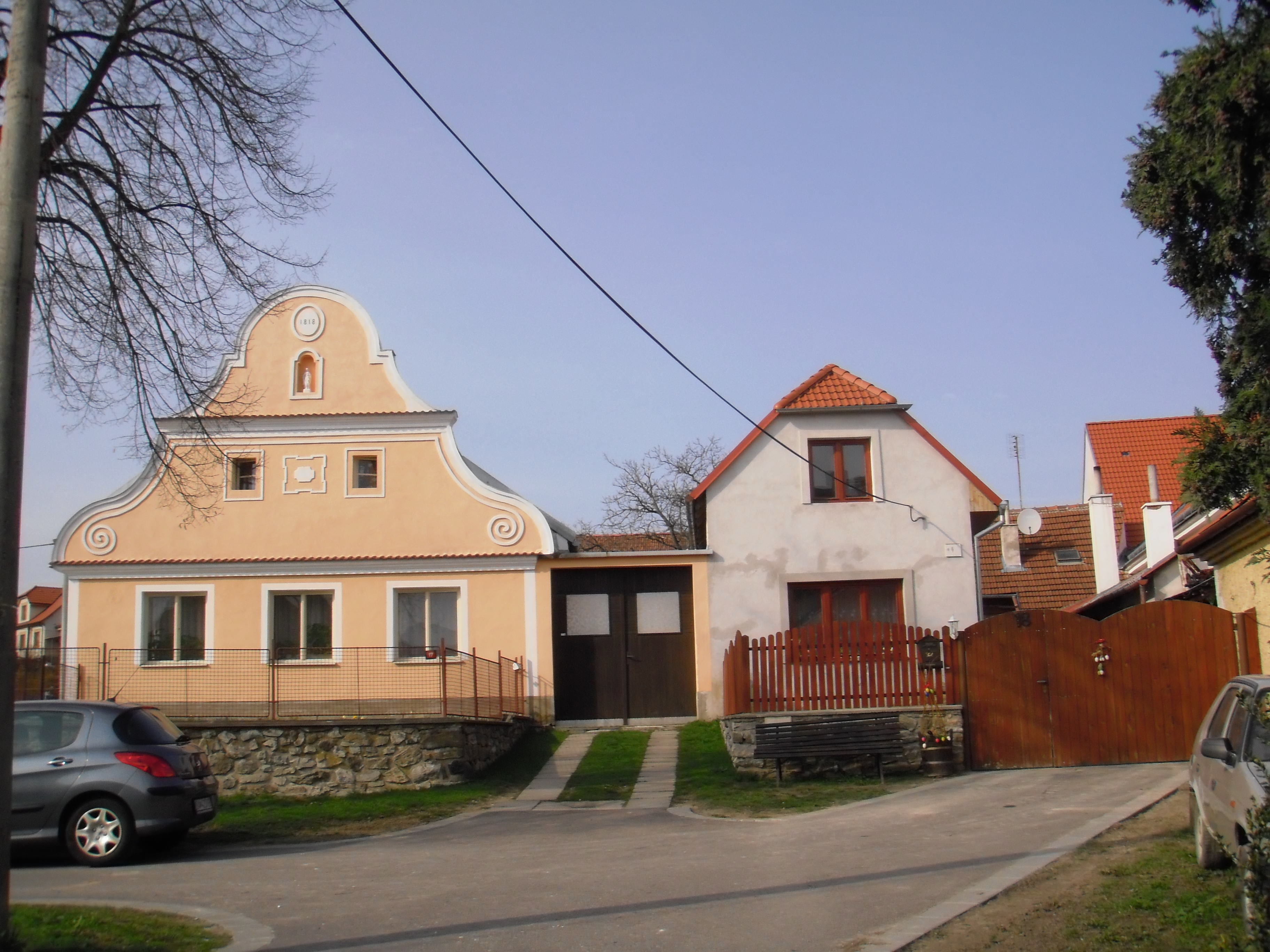 Preserved village Desov (CZ)